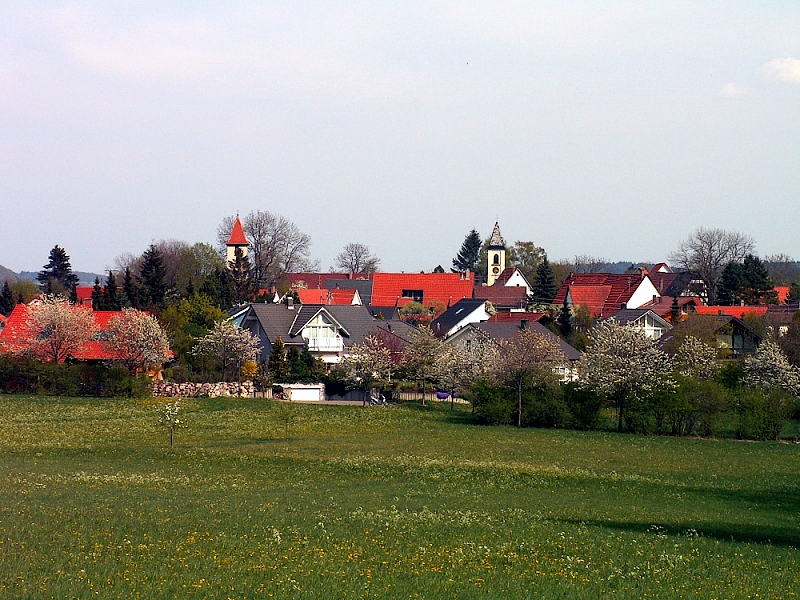 Blick auf Albstadt-Burgfelden